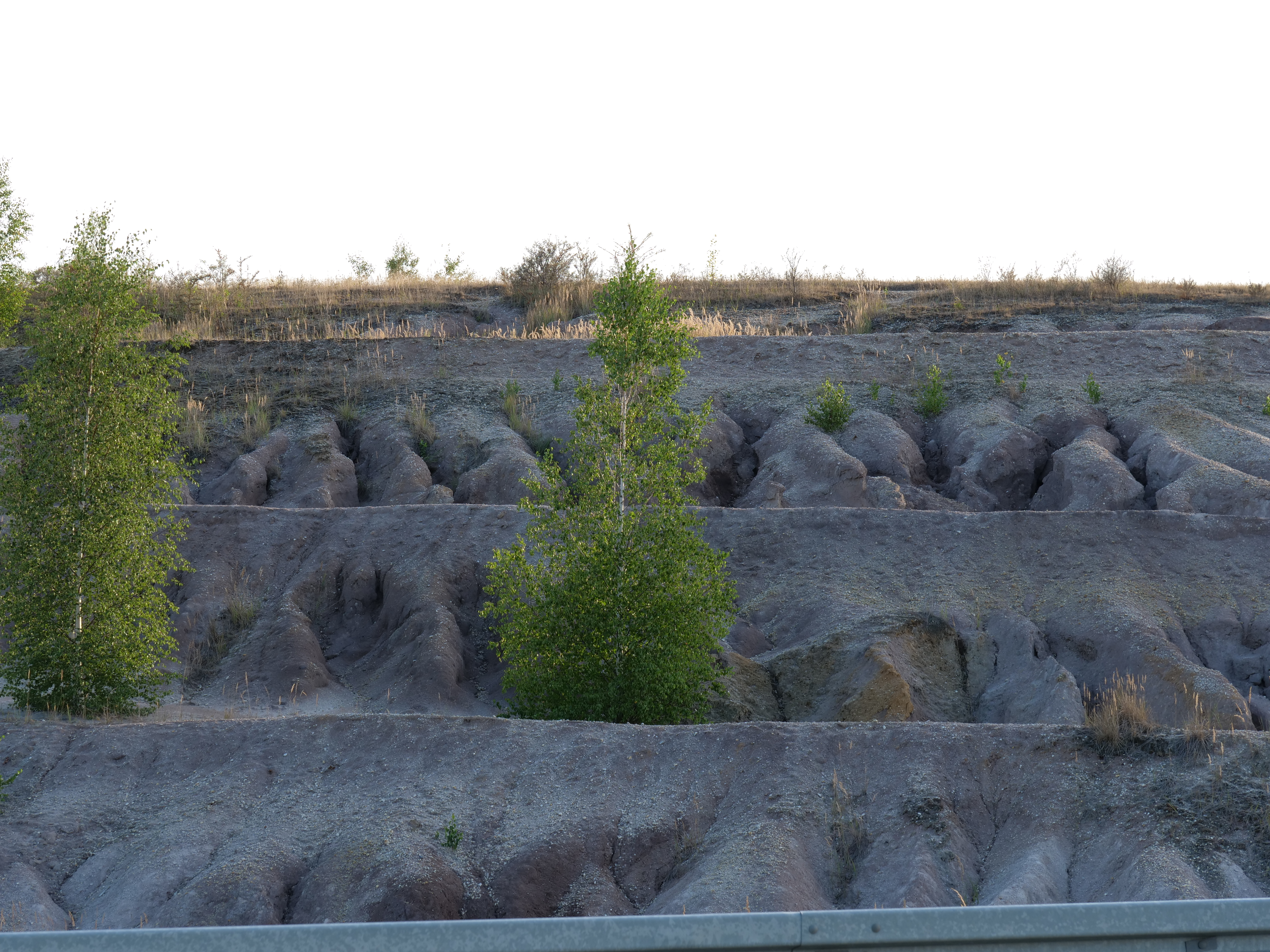 Landschaft um den Tagebau Vereinigtes Schleenhain.